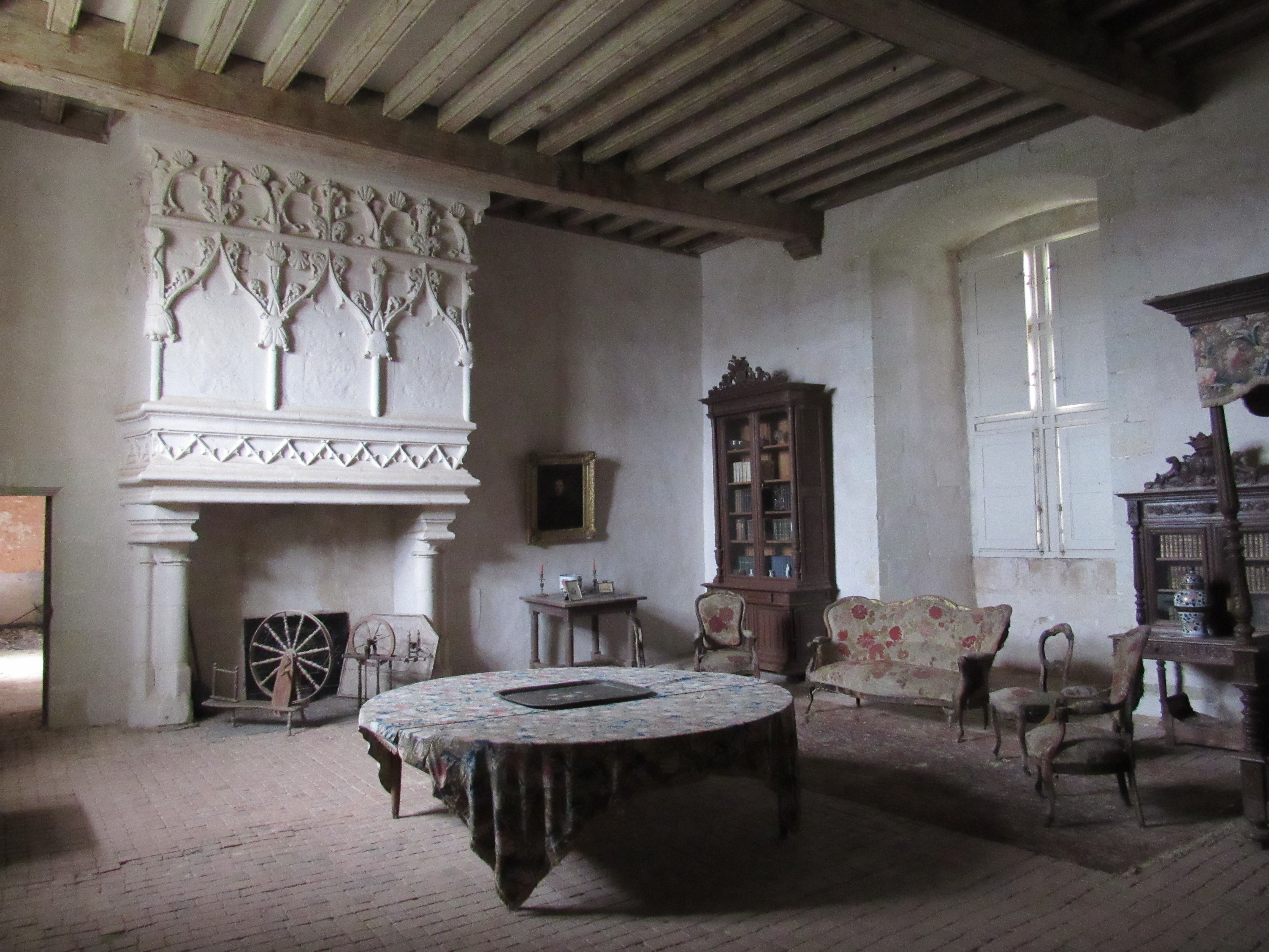 La chambre à coucher du château de la Motte-Glain.